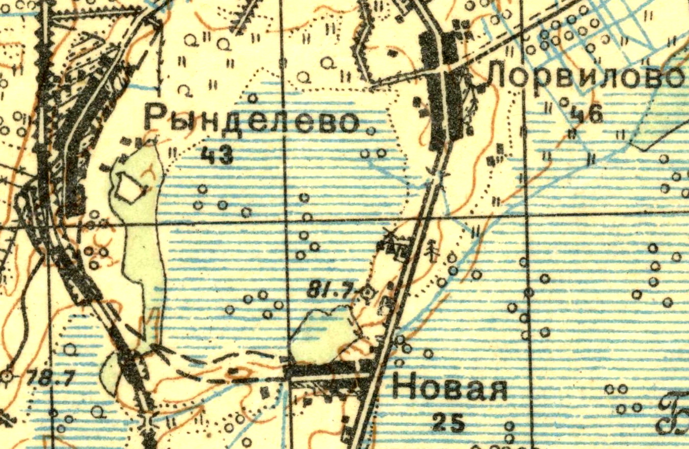 Топографическая карта Ленинградской области, квадрат О-36-14-А (п. Фёдоровский), деревня Рынделево